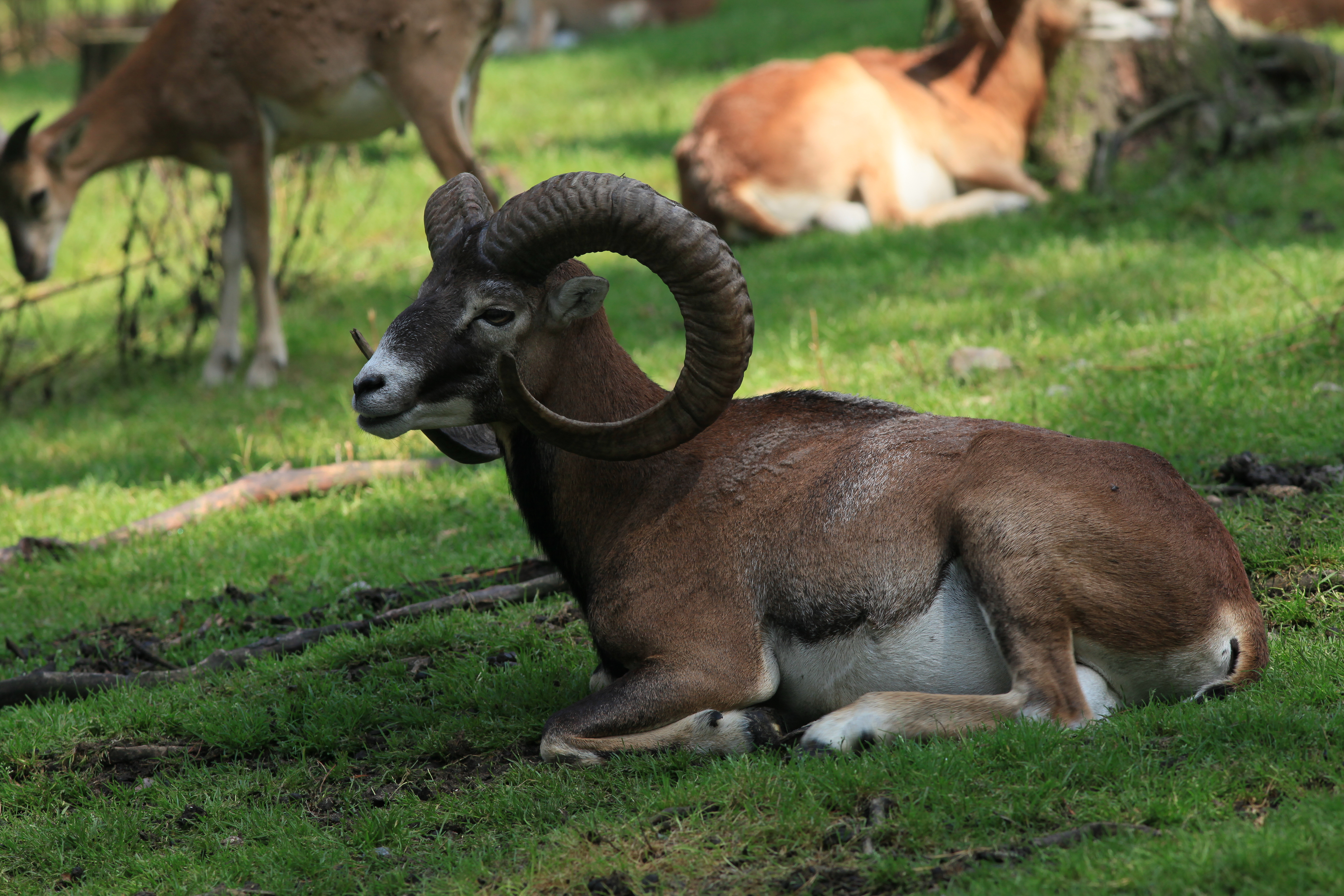 Muffelwild Ovis orientalis musimon/Ovis musimonim Naturwildpark Granat in Haltern am See